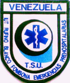 IUT Rufino Blanco Fombona TSUPh Paramedico